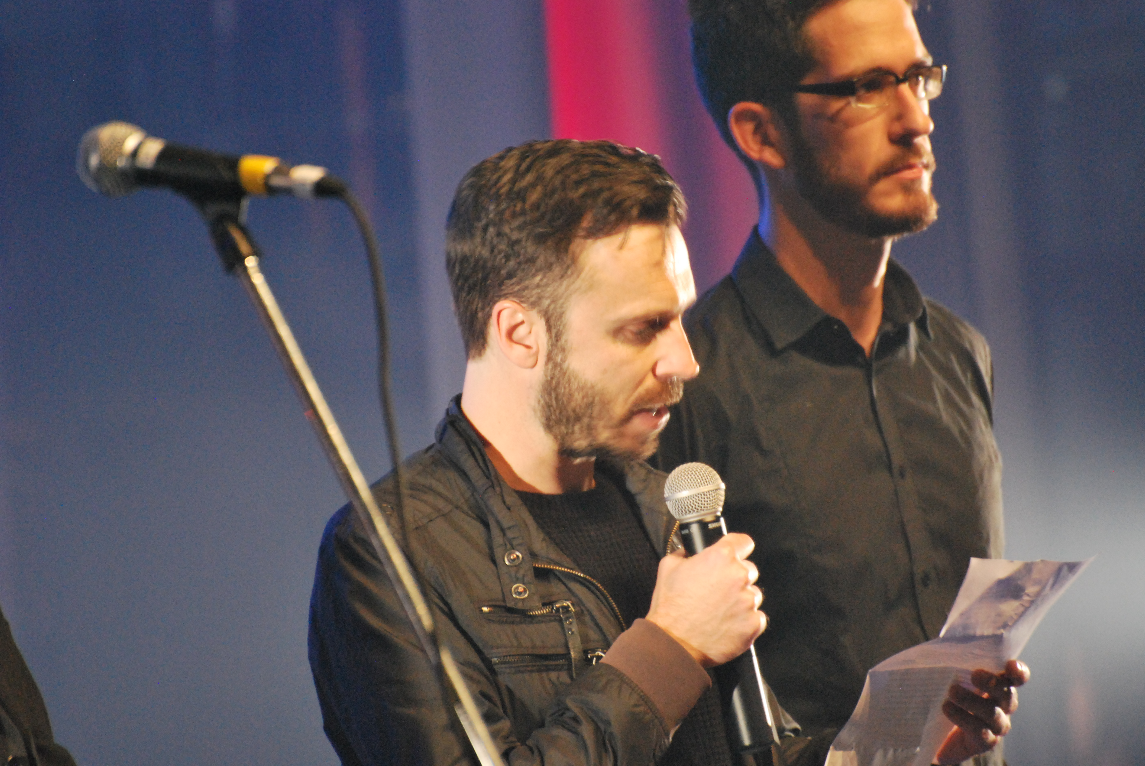 Spectacle de soutien à la Société Radio-Canada tenu à la salle François Brassard du Cégep de Jonquière le 8 octobre 2014. Sébastien Pilote.